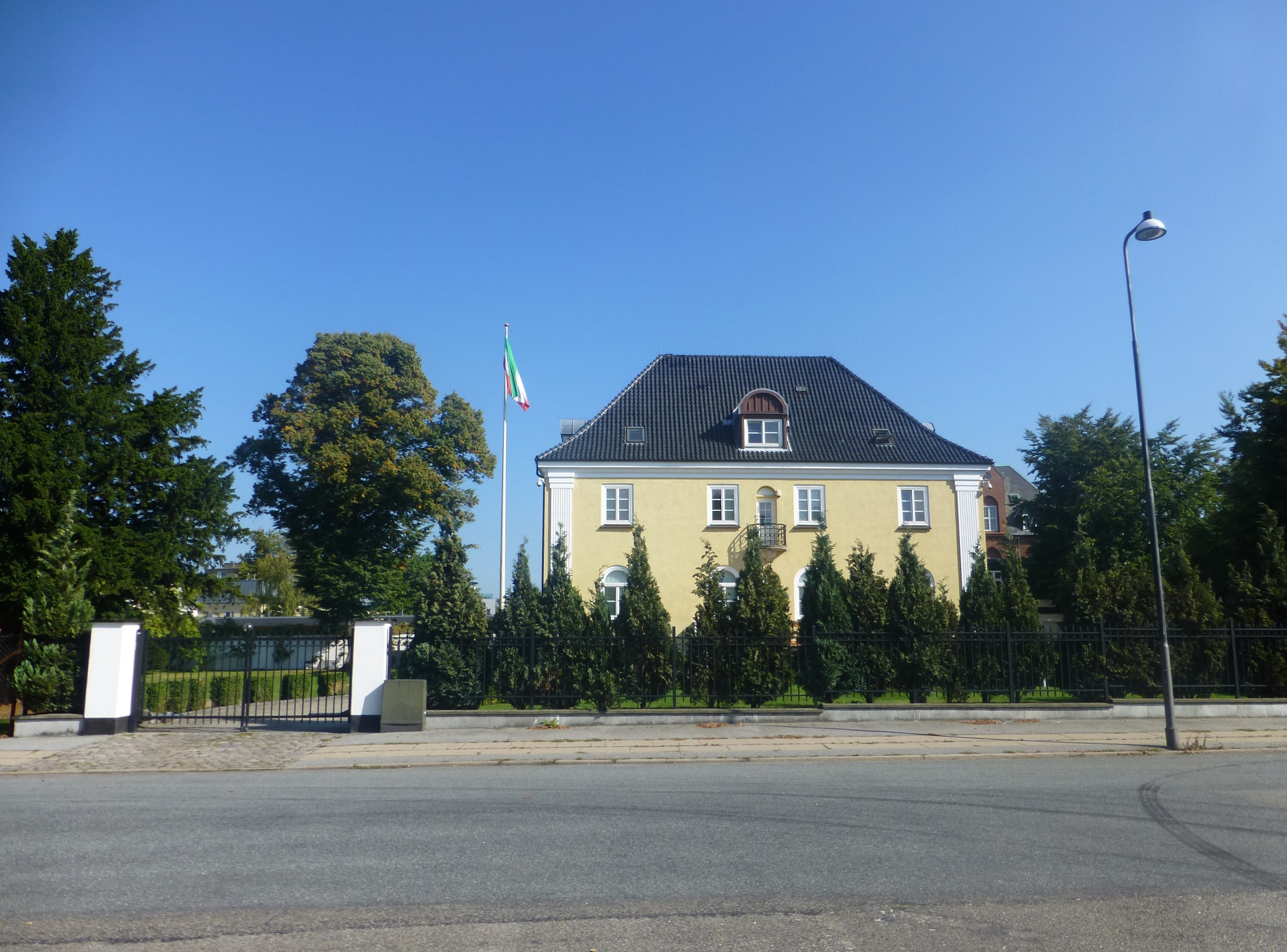 The embassy of Iran at Svanemøllevej in Østerbro in Copenhagen.